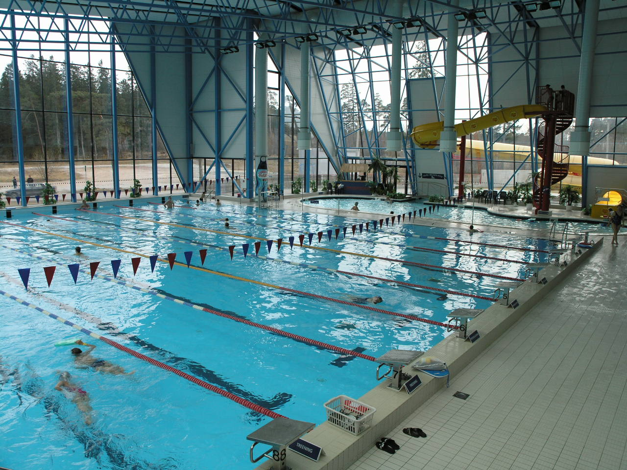 Keila ujula